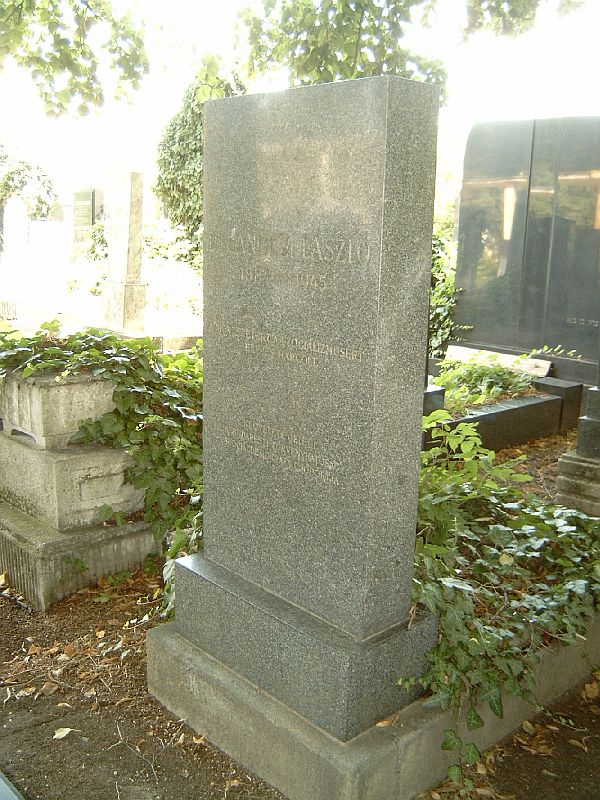 Bánóczi László (Budapest, 1884. november 23. – Budapest, 1945. június 12.) színházi szakíró, rendező, műfordító, Bánóczi József fiának sírja Budapesten. Kozma utcai izraelita temető: 5B-8-1